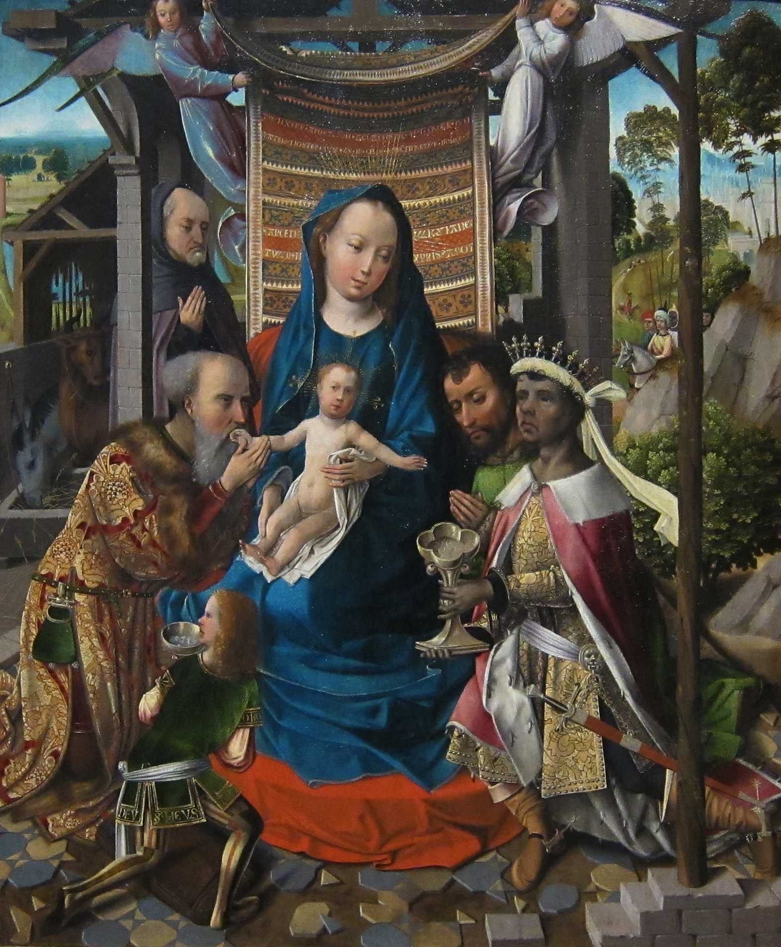 Colijn de Coter (ca. 1450-ca. 1540) - De aanbidding door de wijzen - MSK Gen